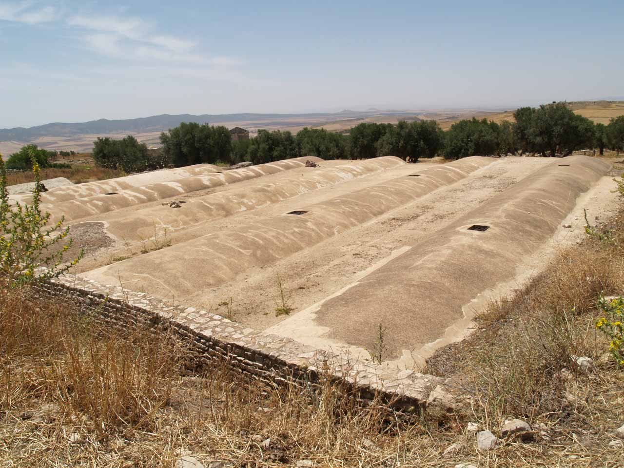 Dougga